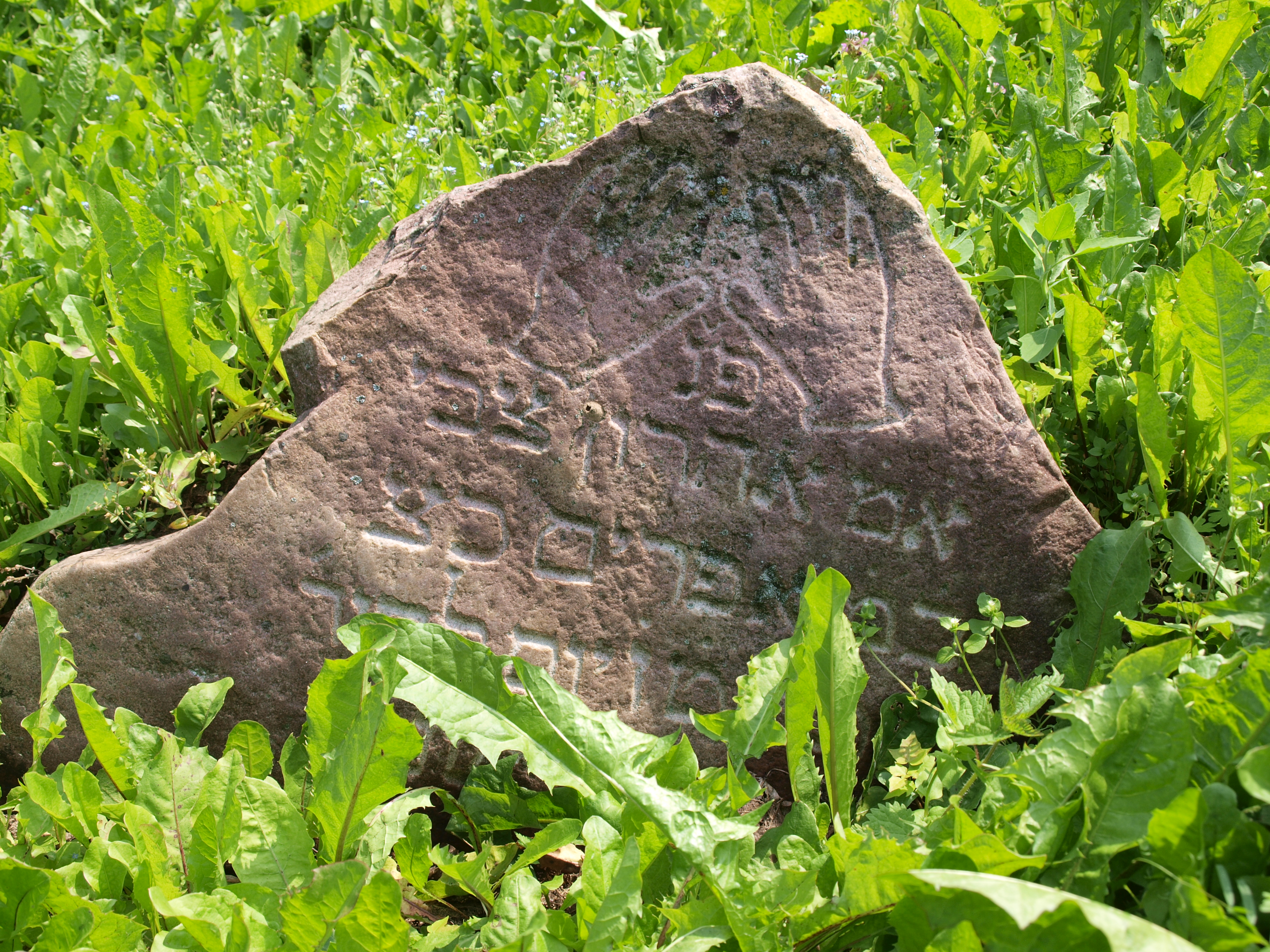 Cmentarz żydowski - macewa z 1852 r. Jeleniewo, ul. Suwalska 20, gm. Jeleniewo